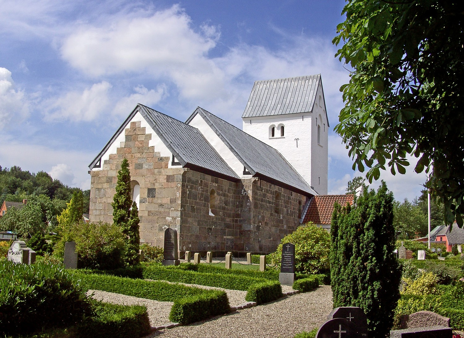 fra nordøst